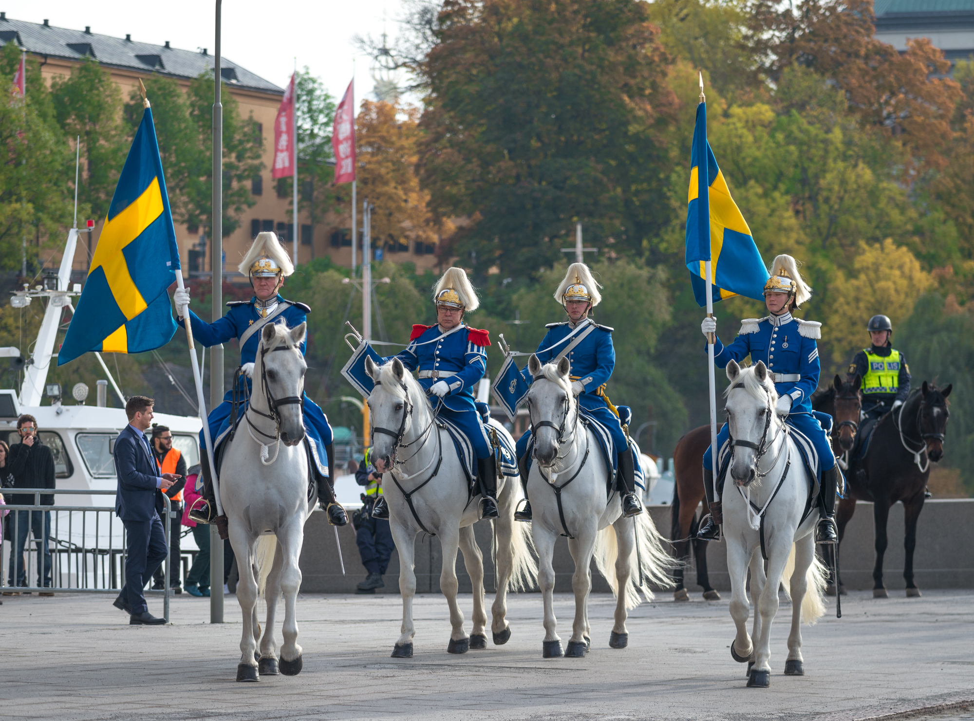 Livgardets dragonmusikkår i samband med nyinvigningen av Nationalmuseum i Stockholm 2018 i närvaro av HM Drottningen, HKH Kronprinsessan och HKH Prins Daniel, kulturminister Alice Bah Kuhnke, överintendent Susanna Pettersson.